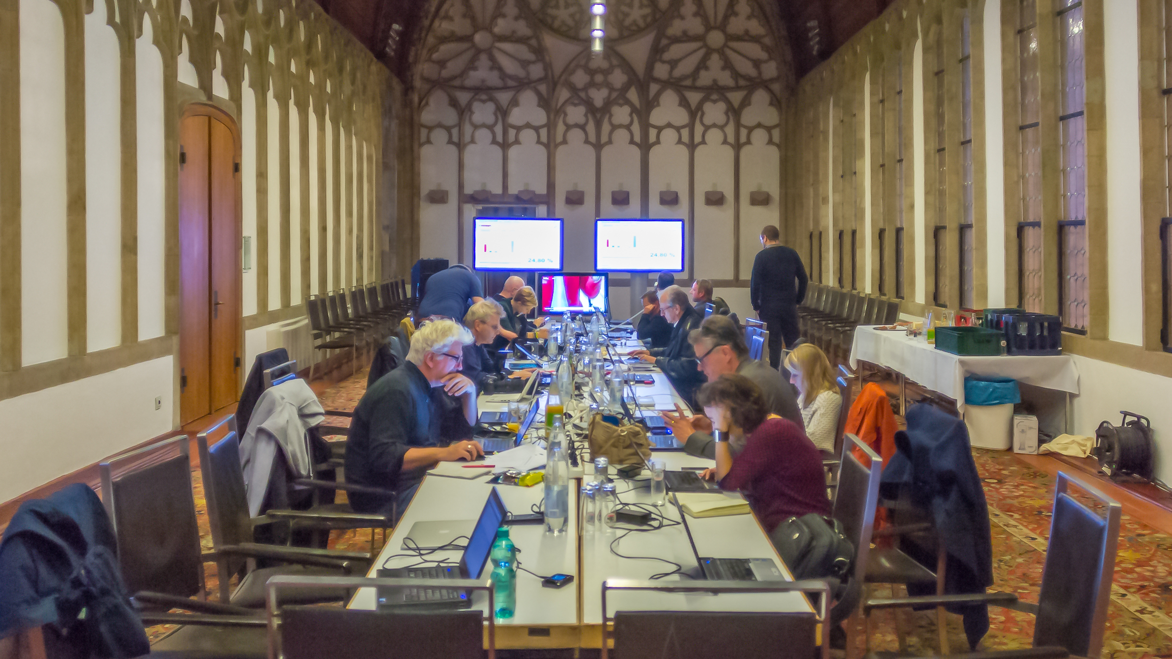 OB-Wahl Köln 2015, Wahlabend in der Piazetta des Historischen Rathauses von Köln Foto: Im Hansasaal wurde das Pressezentrum eingerichtet.